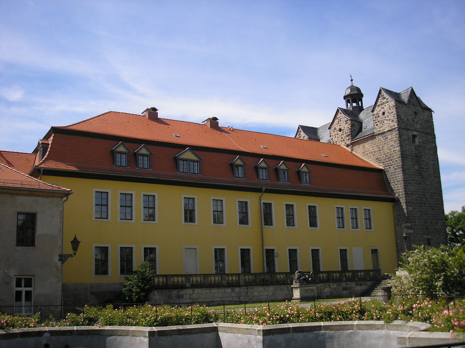 Das Schloss in Ballenstedt (Sachsen-Anhalt).